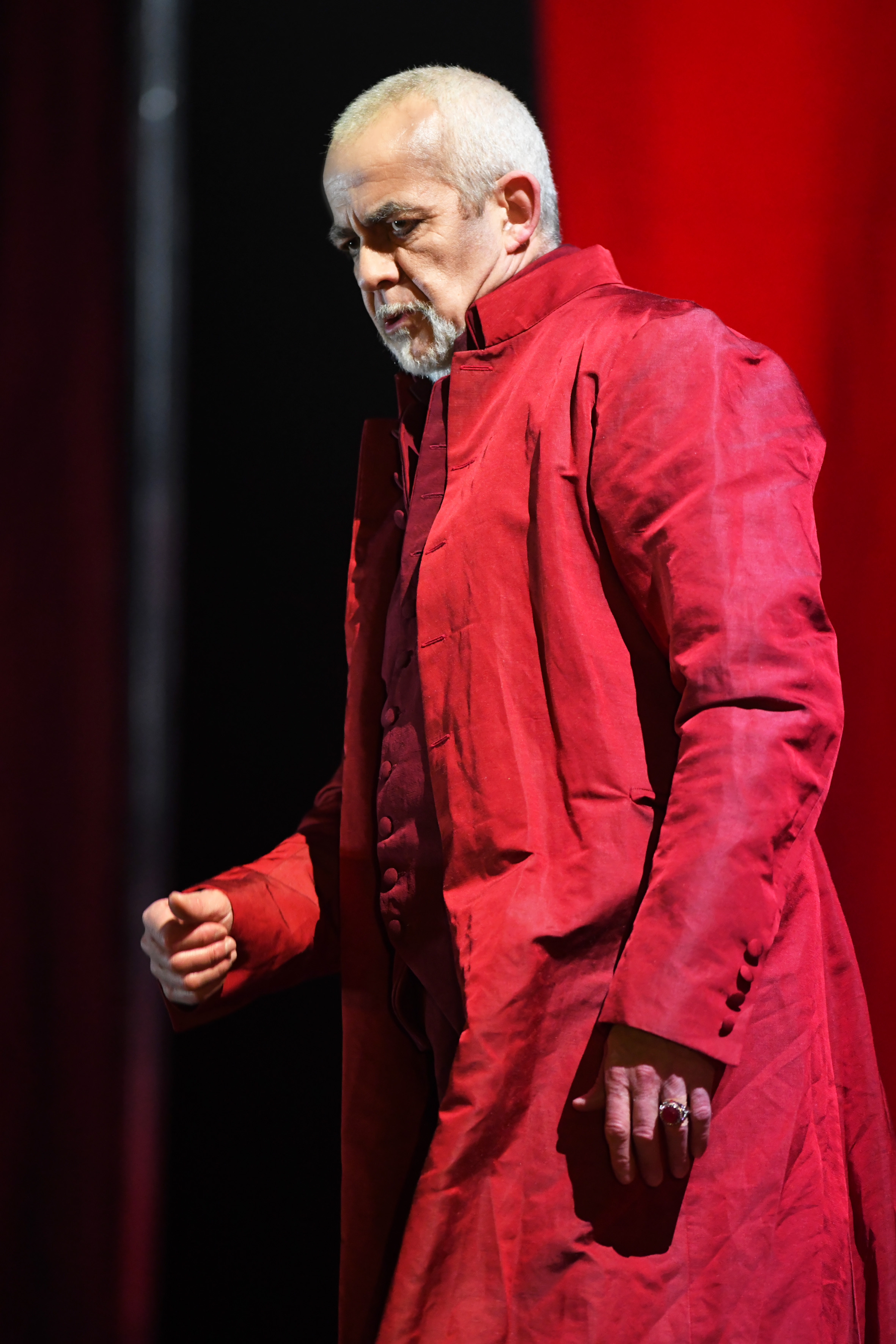 La Gioconda 2018 . Foto Roberto Ricci